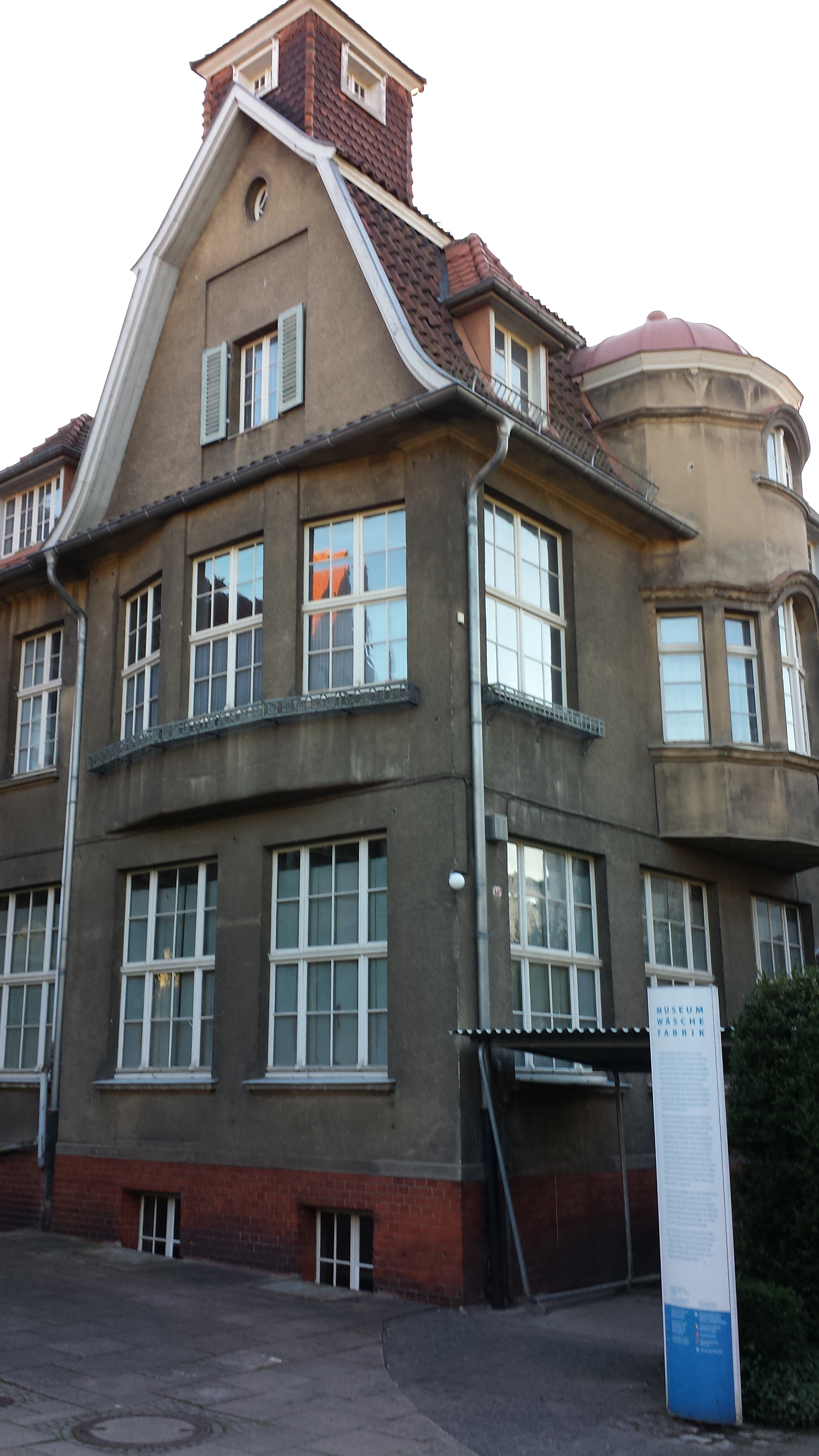 Museum Wäschefabrik in Bielefeld